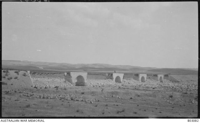 מסילת הרכבת מנחל שורק לקוסיימה: גשר הרכבת מעל נחל רביבים בביר עסלוג'